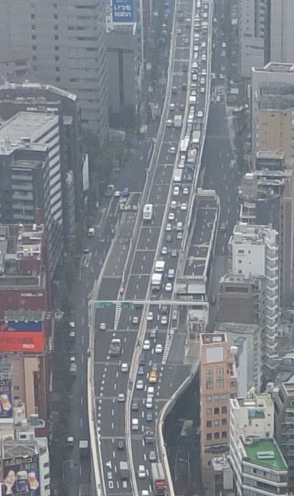 平成25年10月に六本木ヒルズから撮影した、首都高速3号線の高樹町出入口